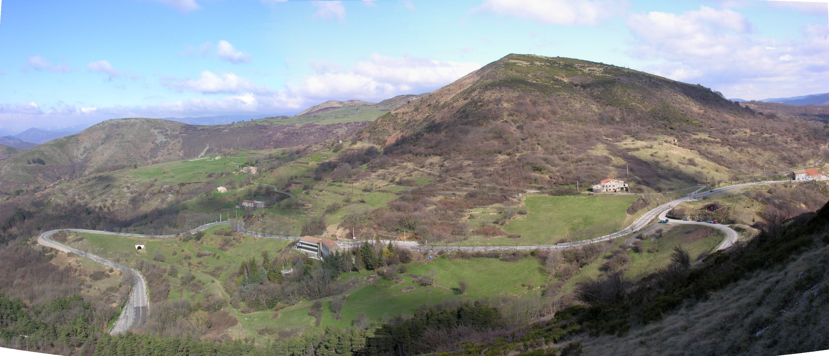 Le col de l'Escrinet et la montagne de Suzon vu de Blandine. Auteur : Séraphin Lampion